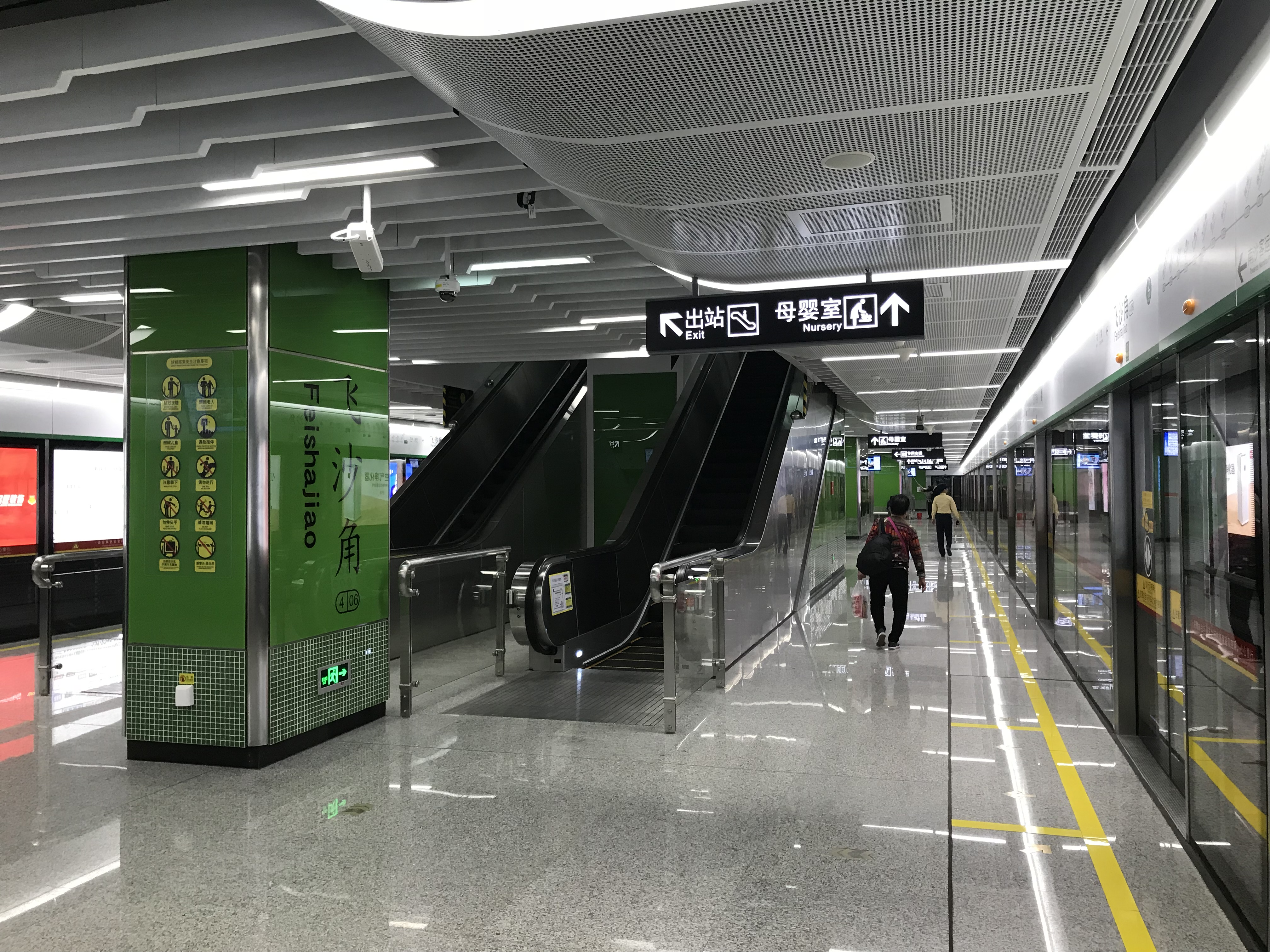 广州地铁飞沙角站